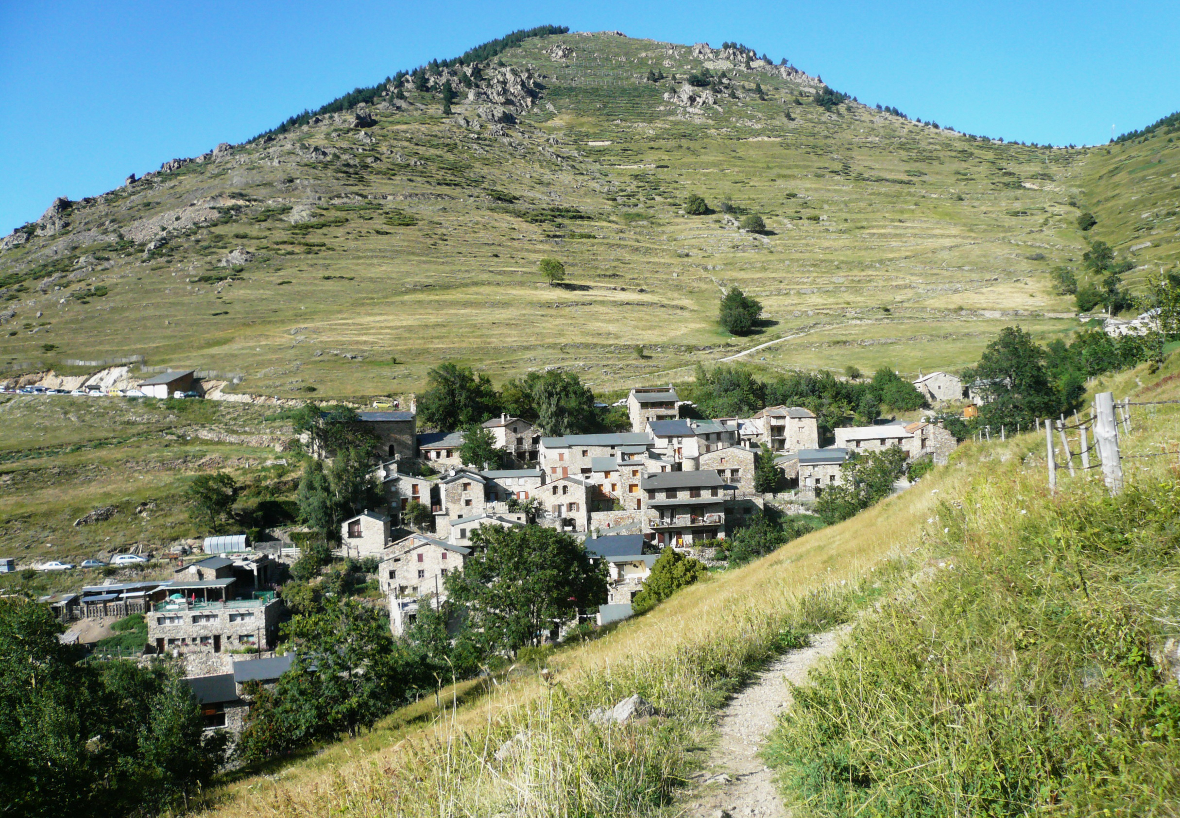 Mantet